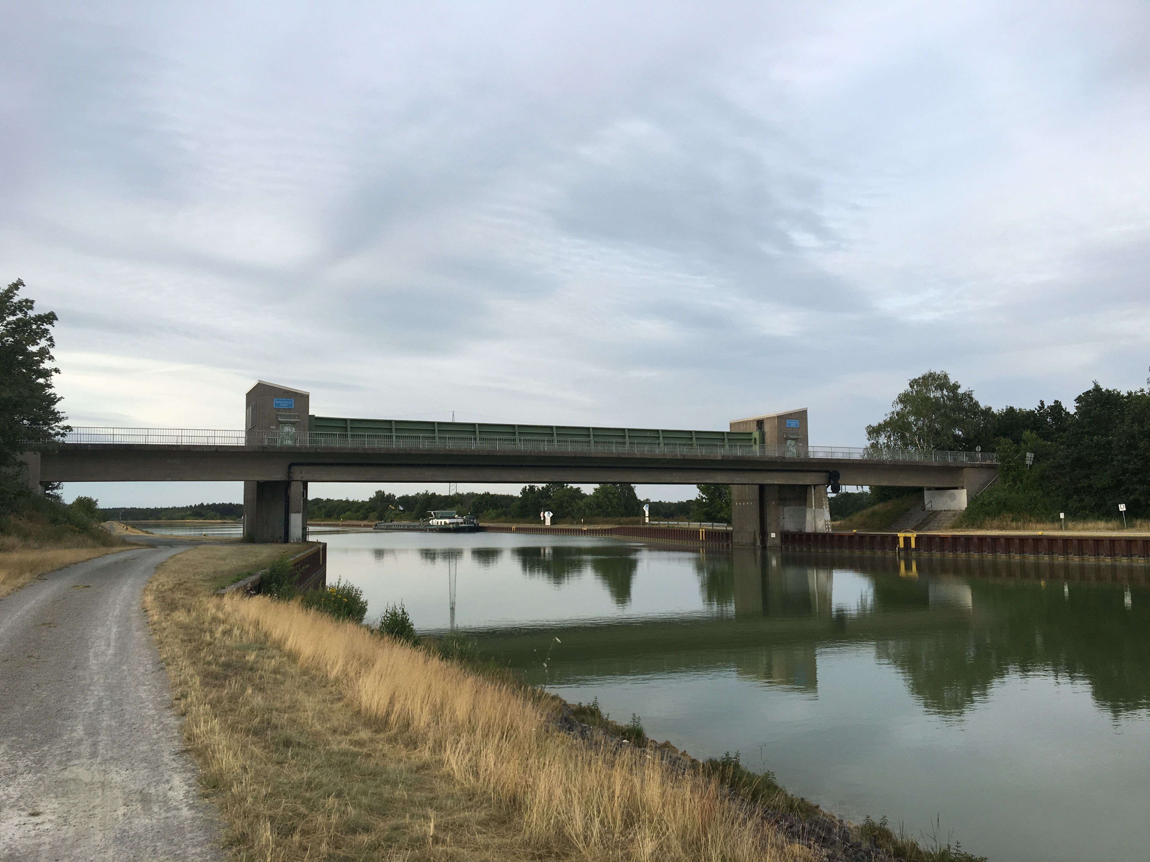 Südansicht des Sicherheitstors Osloß des Elbe-Seitenkanals bei km 9,72